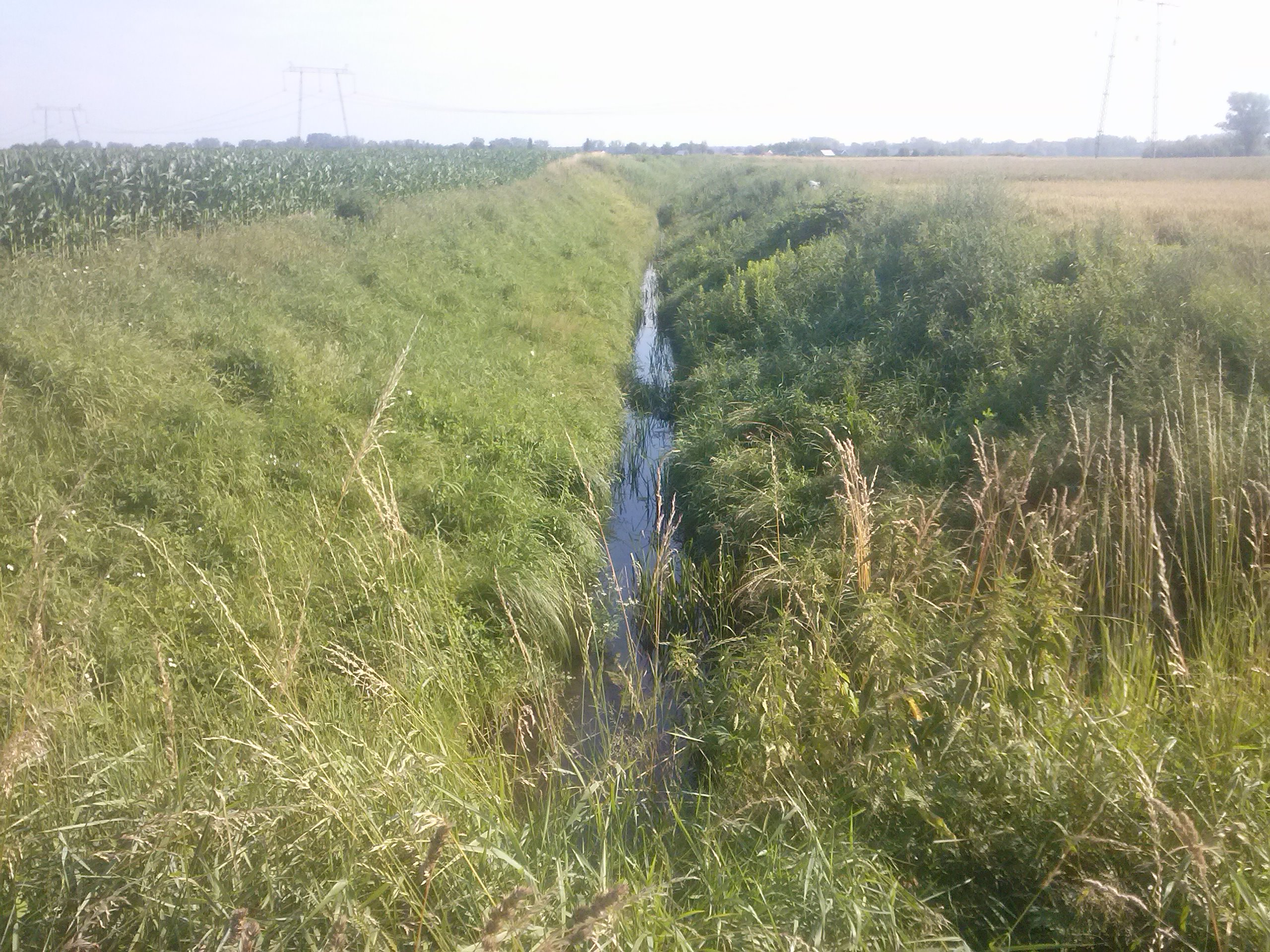 Rzeka Szewnia w Leżachowie-Osadzie, przy granicy z Kostkowem (Wielgosy) - widok z drogi w pobliżu cmentarza wojennego